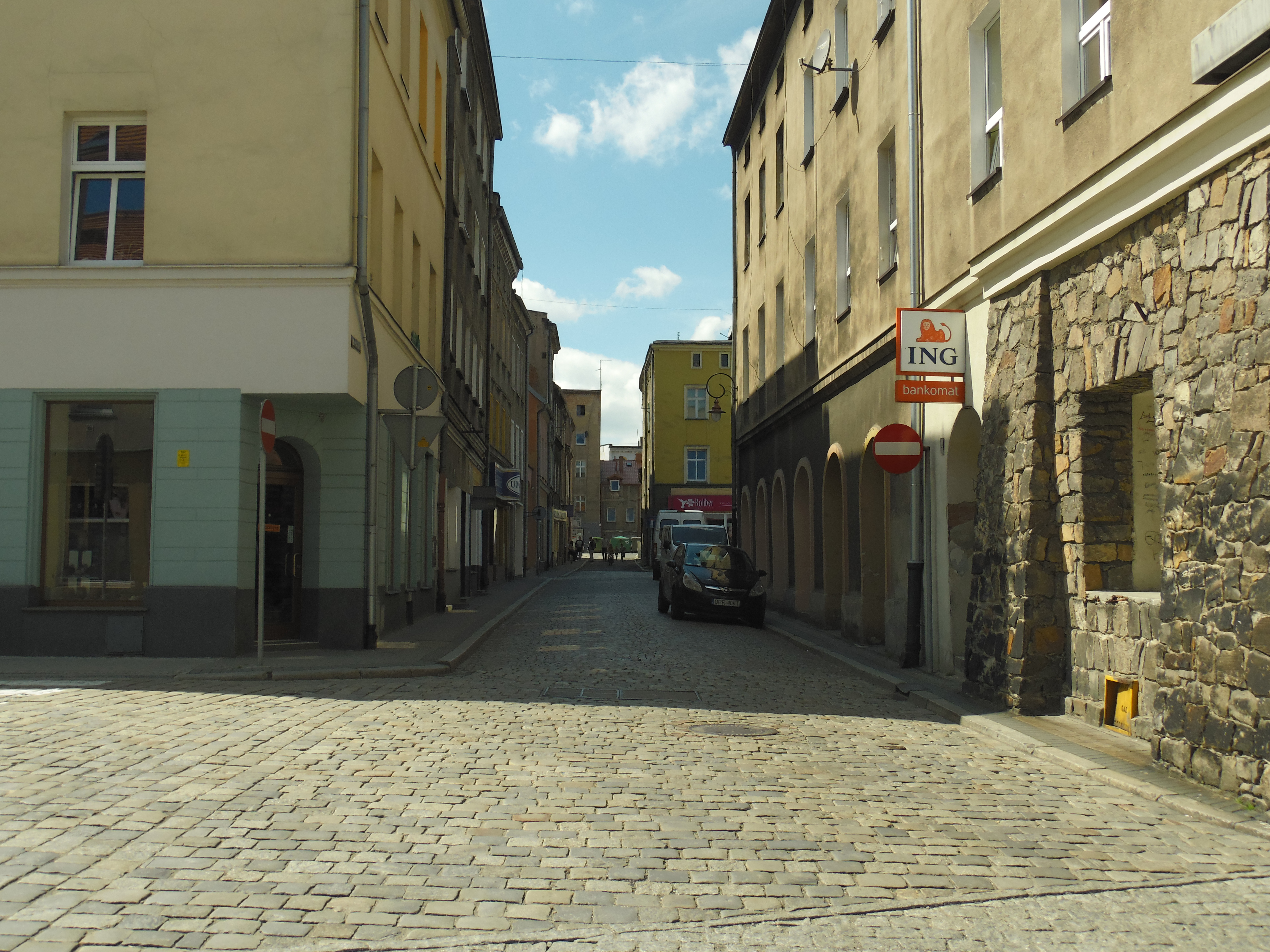 Prudnik, Poland